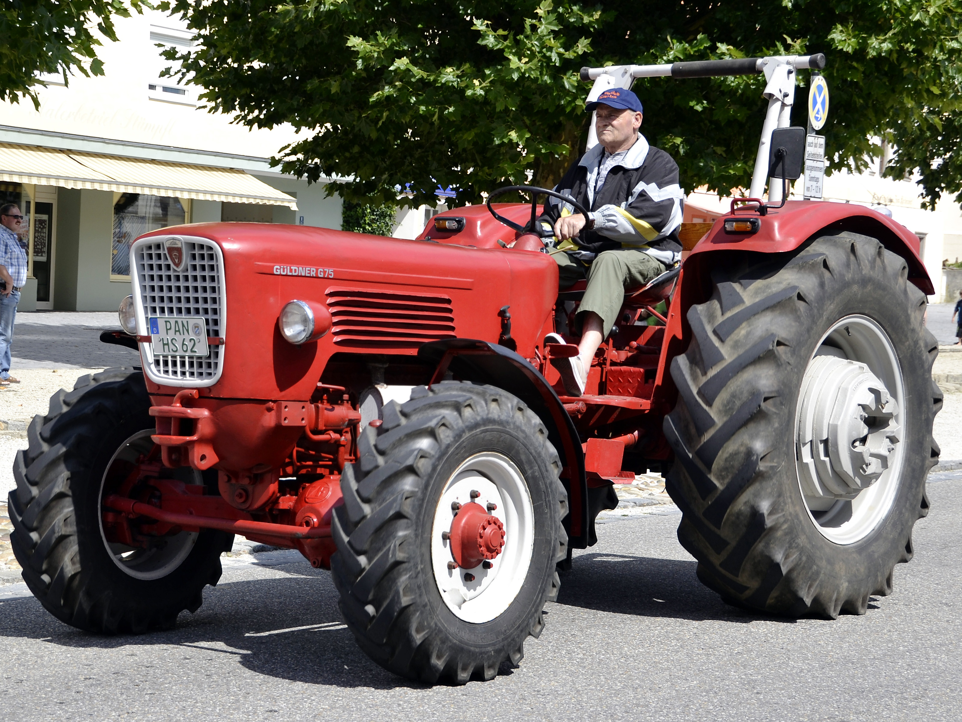 Der Oldtimerumzug in Aidenbach (Bayern) im August 2012.